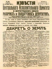 Обложка газеты «Известия Центрального Исполнительного Комитета и Петроградского совета рабочих и солдатских депутатов» Русскій (традицiонная орѳографiя): Обложка газеты «Извѣстія Центральнаго Исполнительнаго Комитета и Петроградскаго совѣта рабочихъ и солдатскихъ депутатовъ»